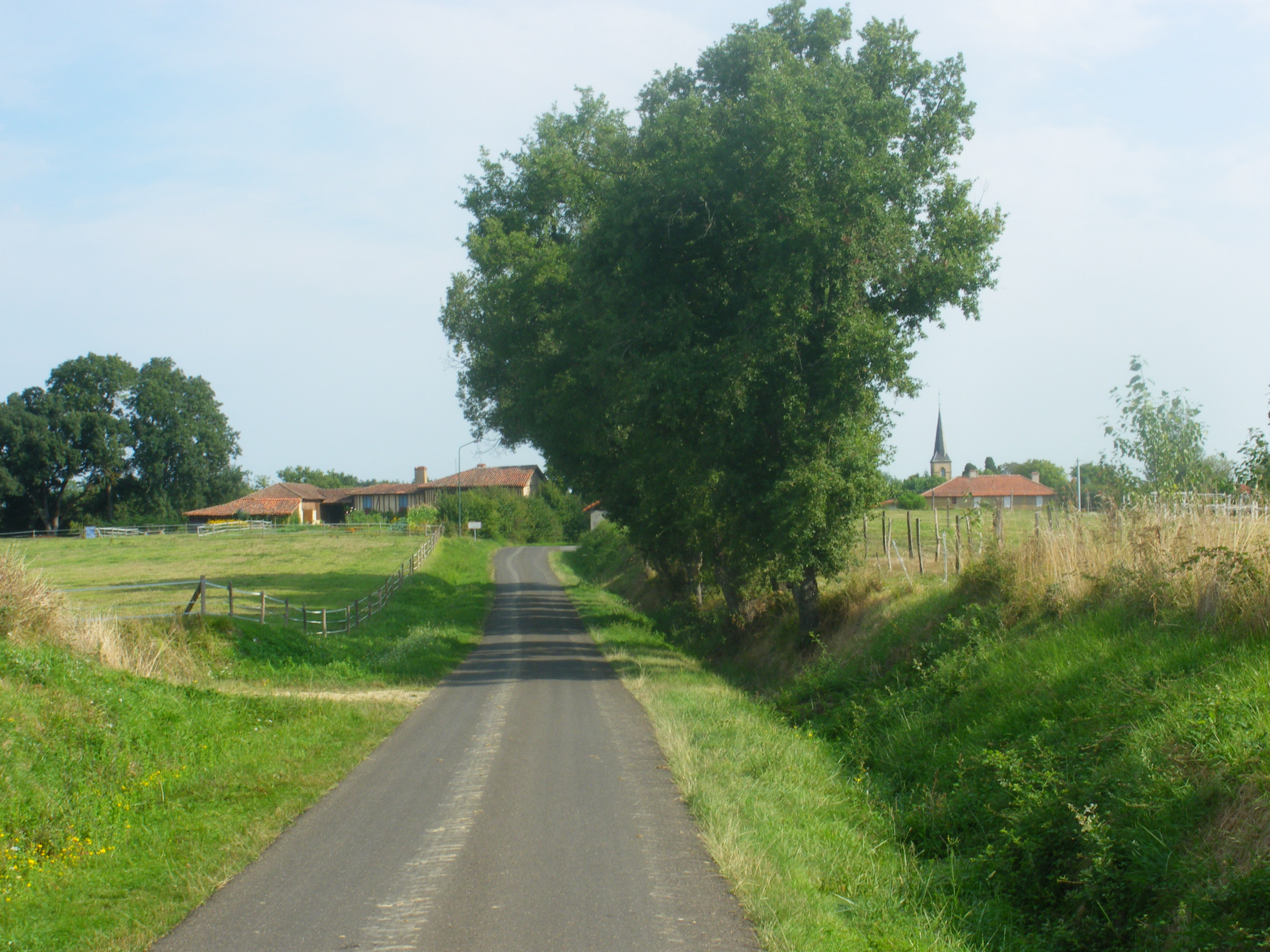 Lagarde Hachan (Gers, France)